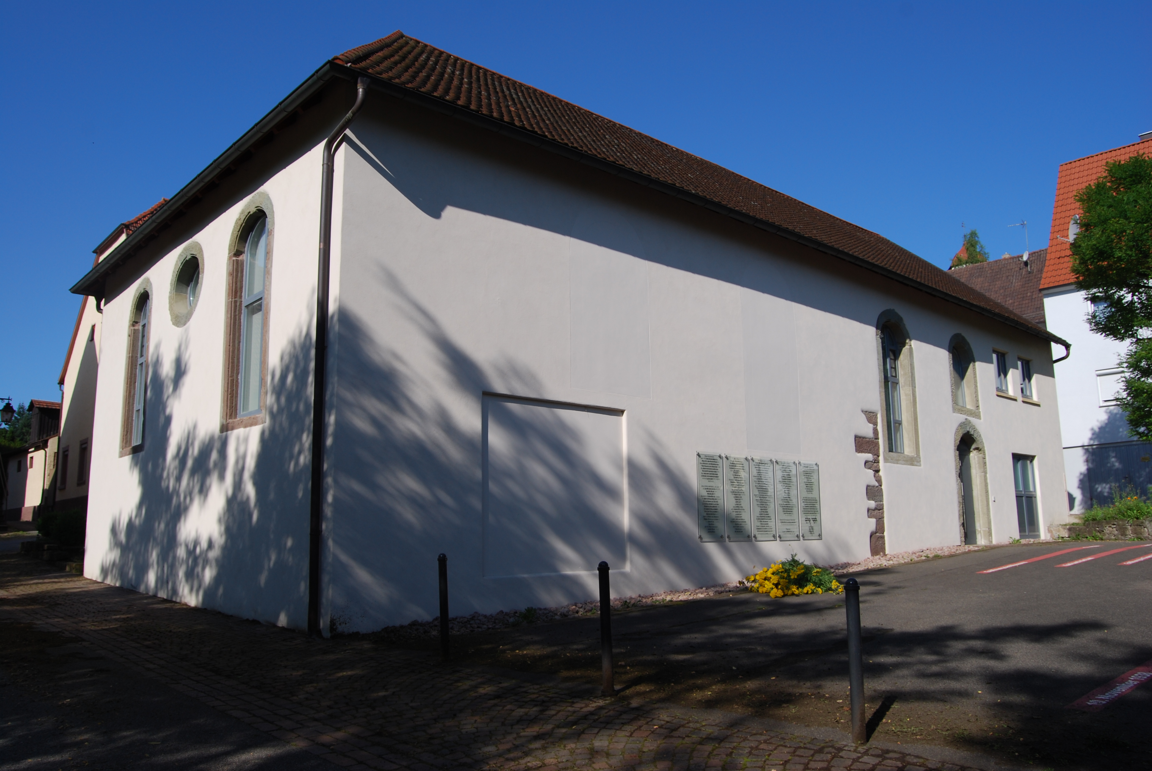 Die ehemalige Synagoge in Haigerloch, Gesamtaufnahme